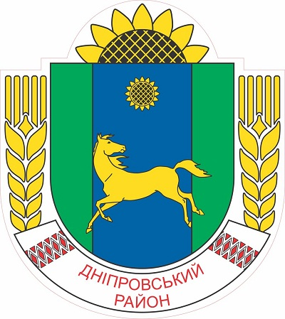 Герб Дніпровського району Дніпропетровської області України